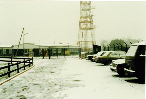 Funkturm bei der amerikanischen Kaserne in Werl